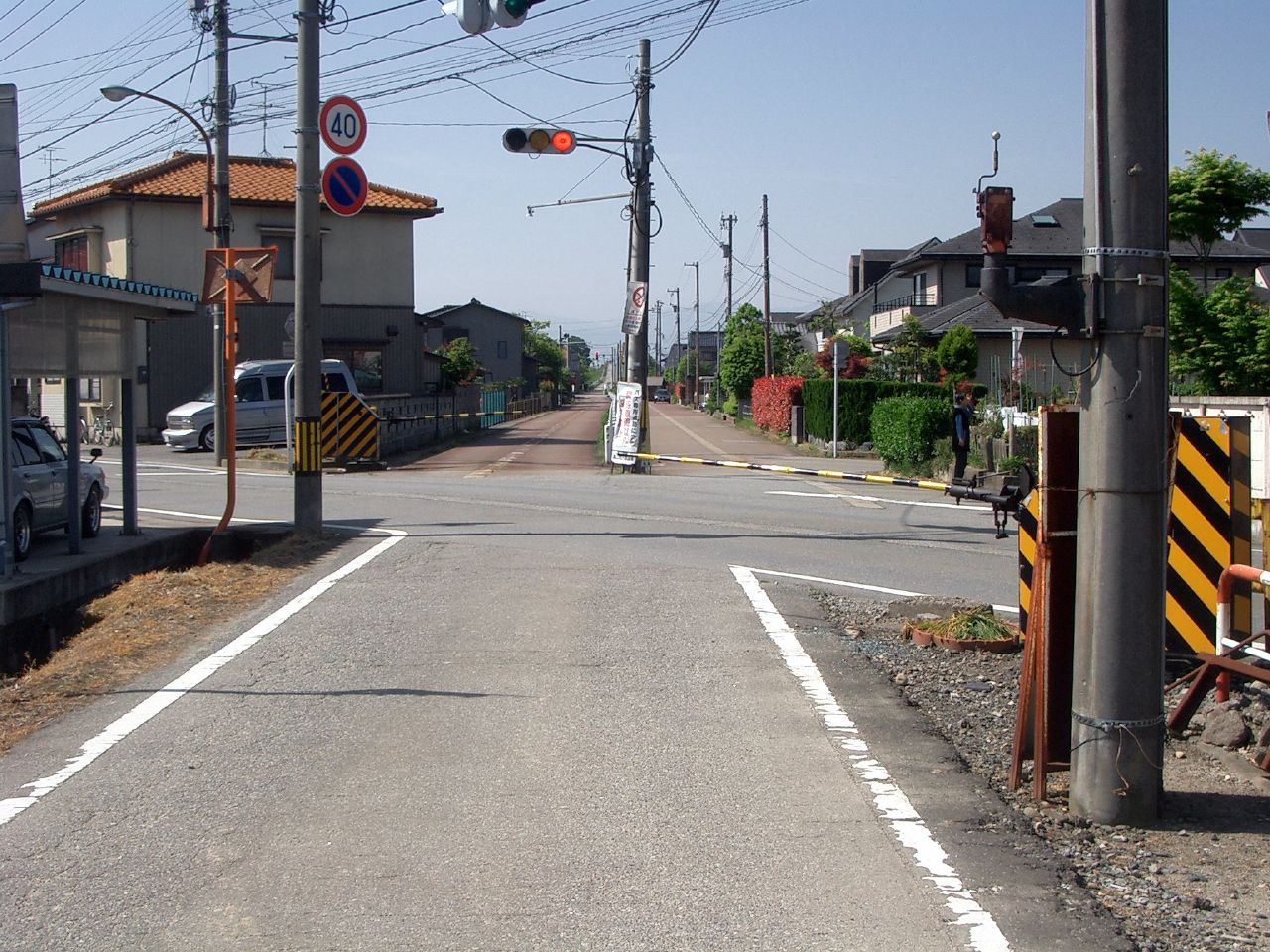 富山地方鉄道射水線跡